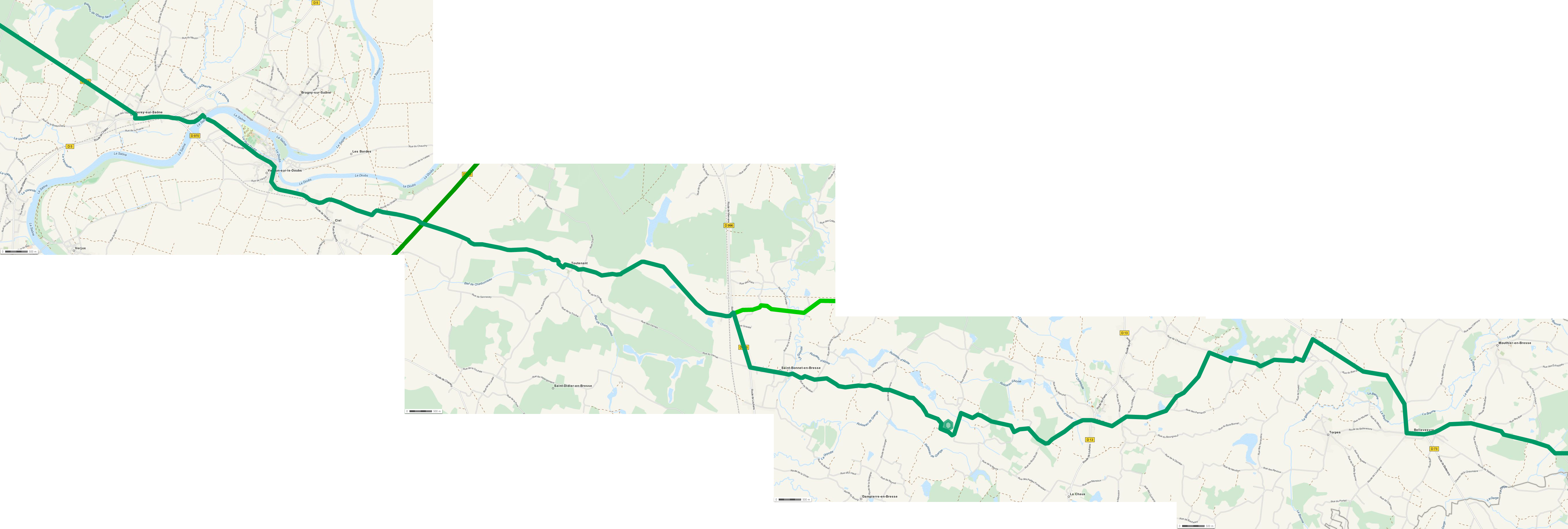 Karte der Römerstrasse von (Autun und) Verdun-sur-le-Doubs nach Poligny - Teilstück Allerey-sur-Saône bis Bellevesvre Carte de la voie romaine de (Autun et) Verdun-sur-le-Doubs à Poligny - Partie entre Allerey-sur-Saône et Bellevesvre This map may be incomplete, and may contain errors. Don't rely solely on it for navigation.